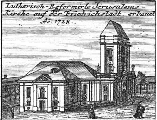 Aus Schleuens Berliner Plan von 1757 entnommen